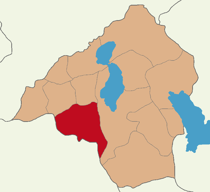 Isparta Merkez ilçesinin konumu